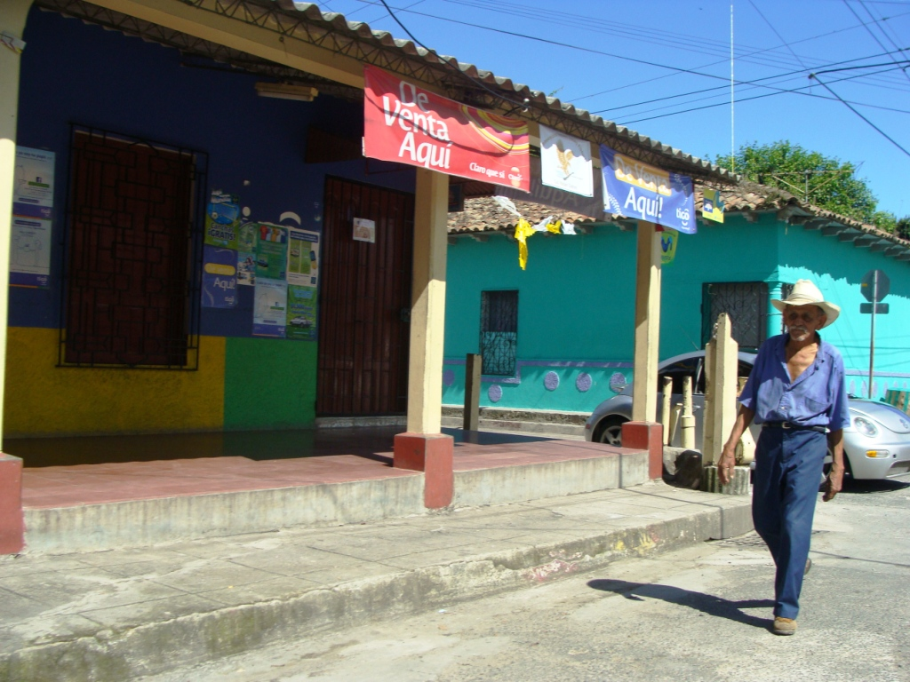 En la Imagen se muestra algunas tiendas en San Rafael Cedros